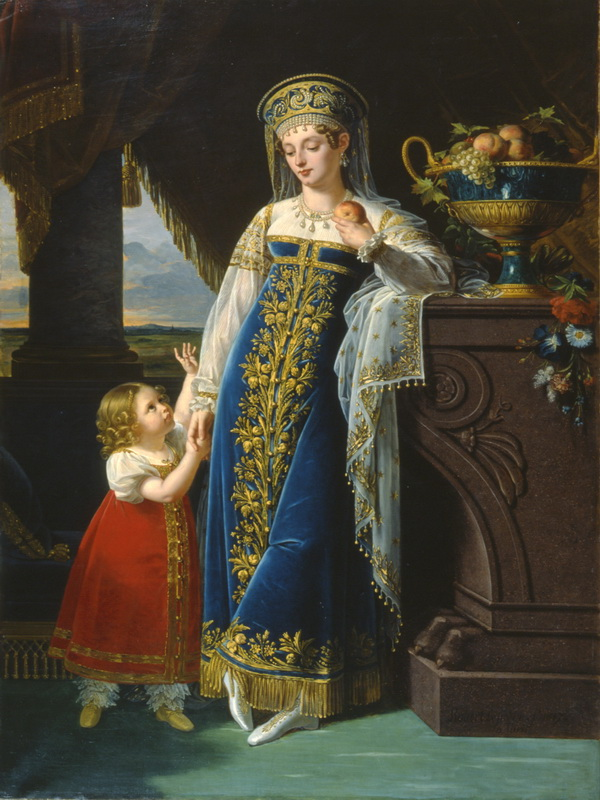 Лефевр Робер. Портрет княгини М.Ф. Барятинской с дочерью Ольгой, в замужестве Орлова-Давыдова, 1817.